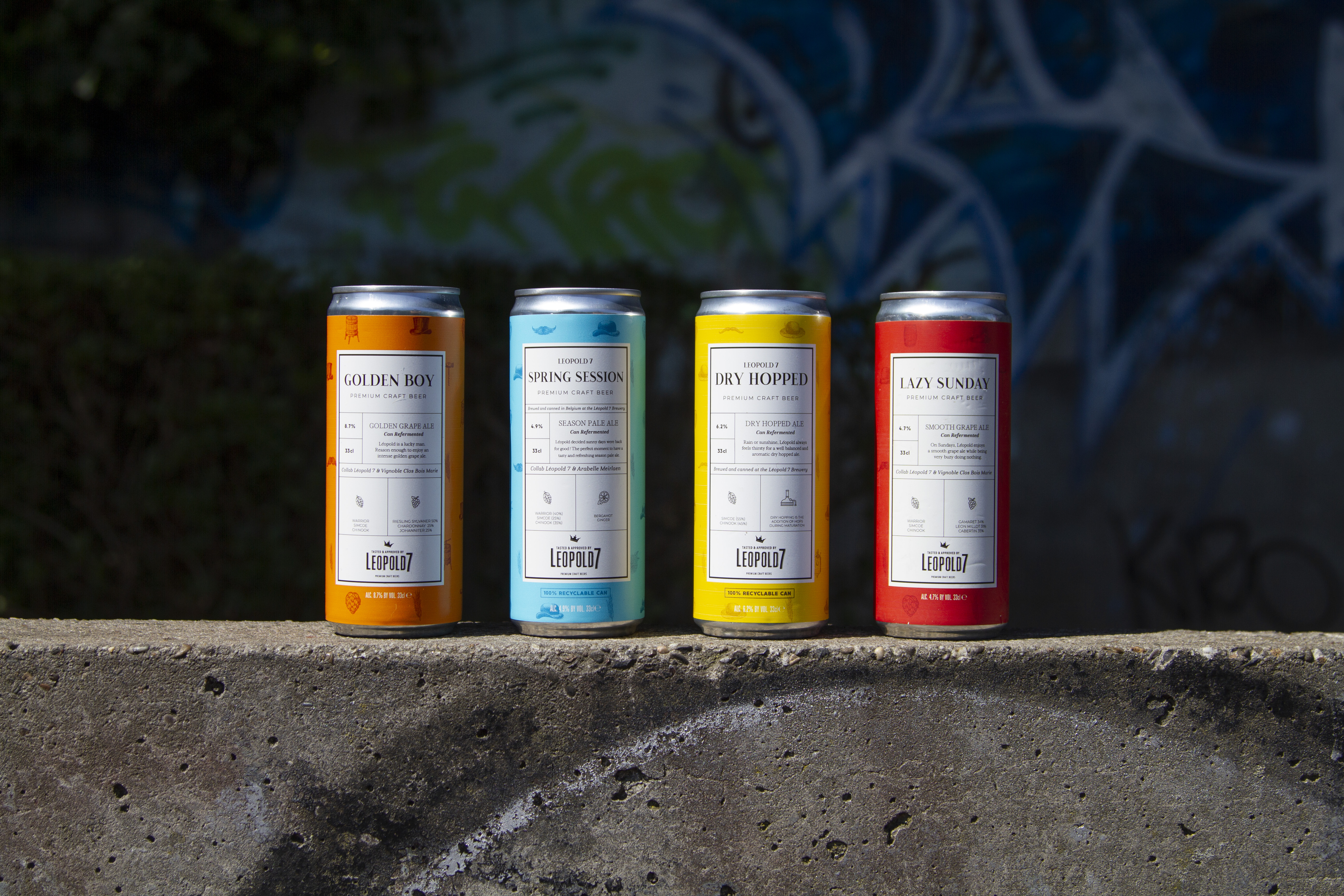 Golden Boy, Lazy Sunday, Dry Hopped, Spring Session by Léopold 7